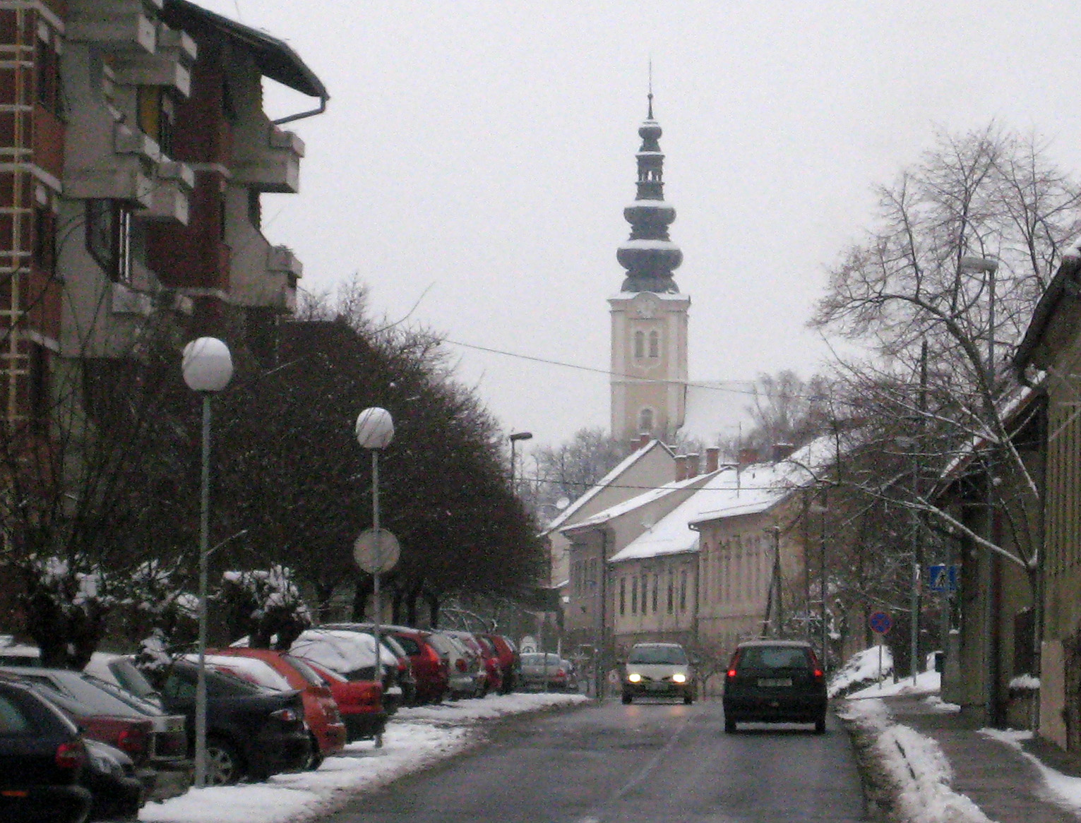 Lendava, town in Slovenia